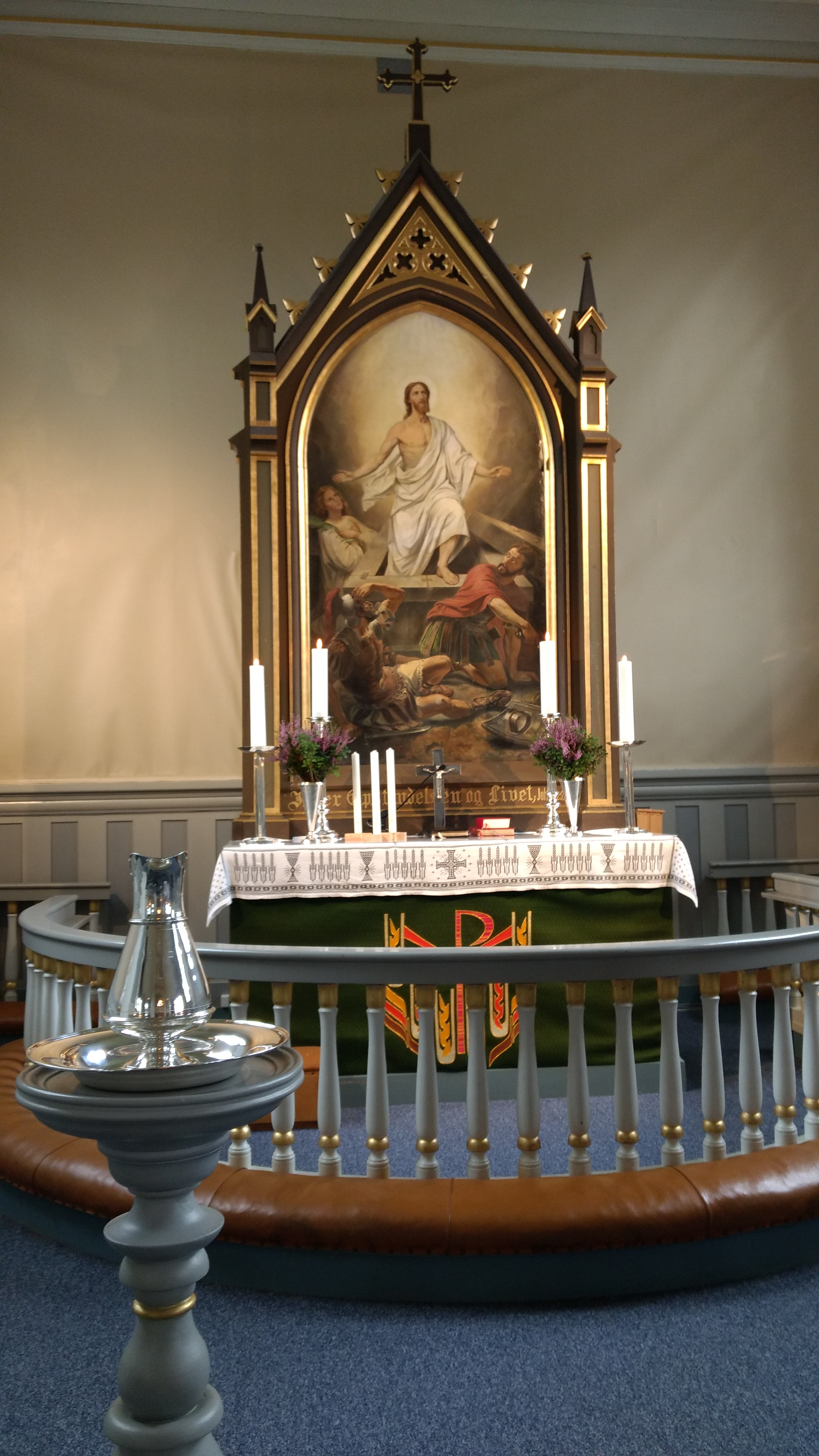 Altar in Hval church, Ringerike, Norway